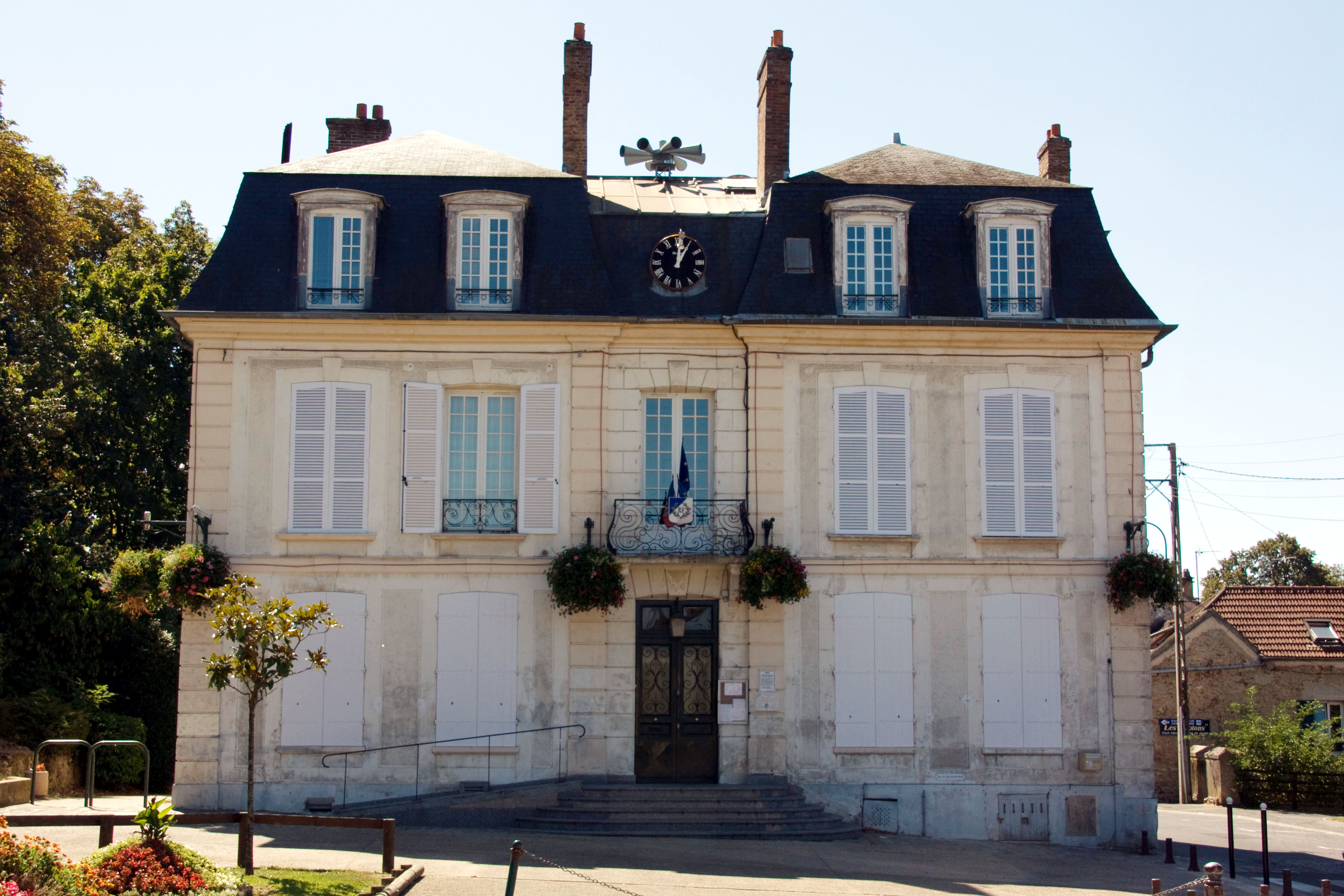 Mairie de Saintry-sur-Seine, Saintry-sur-Seine, Essonne, France